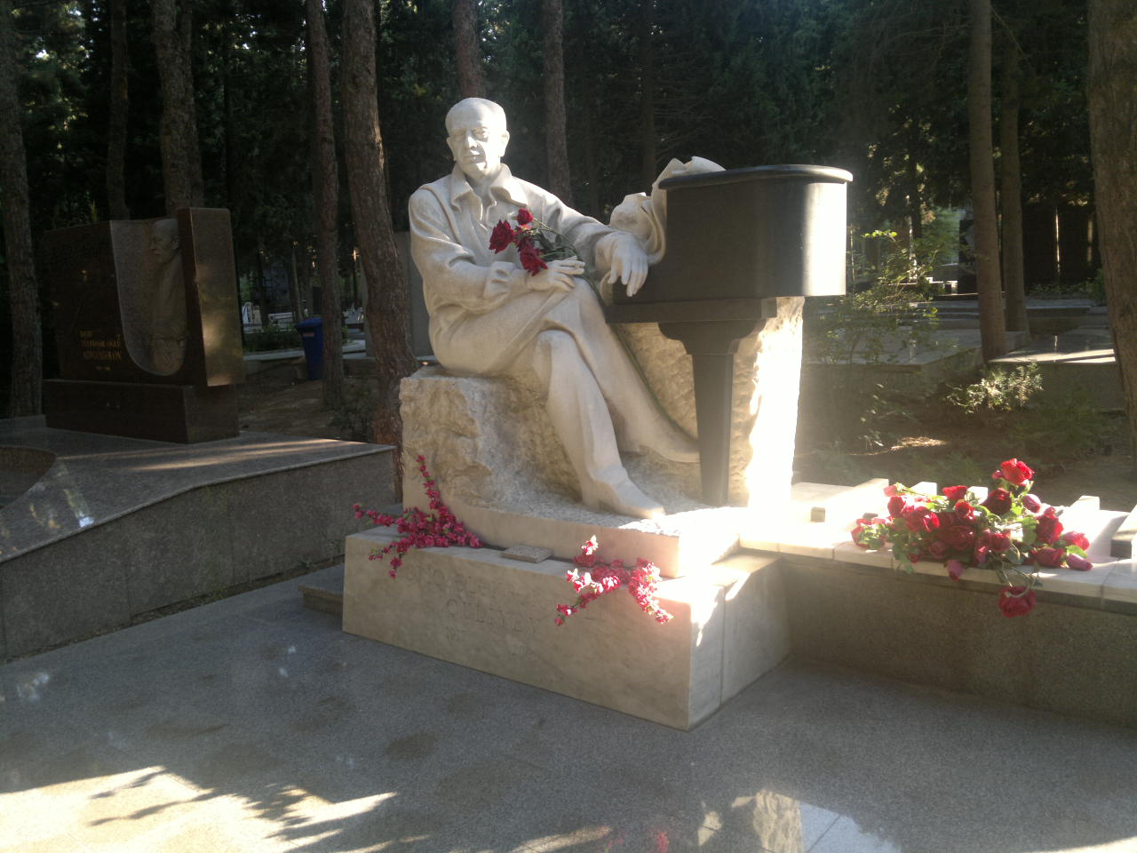 Tofiq Quliyevin I Fəxri Xiyabandakı məzarüstü abidəsi